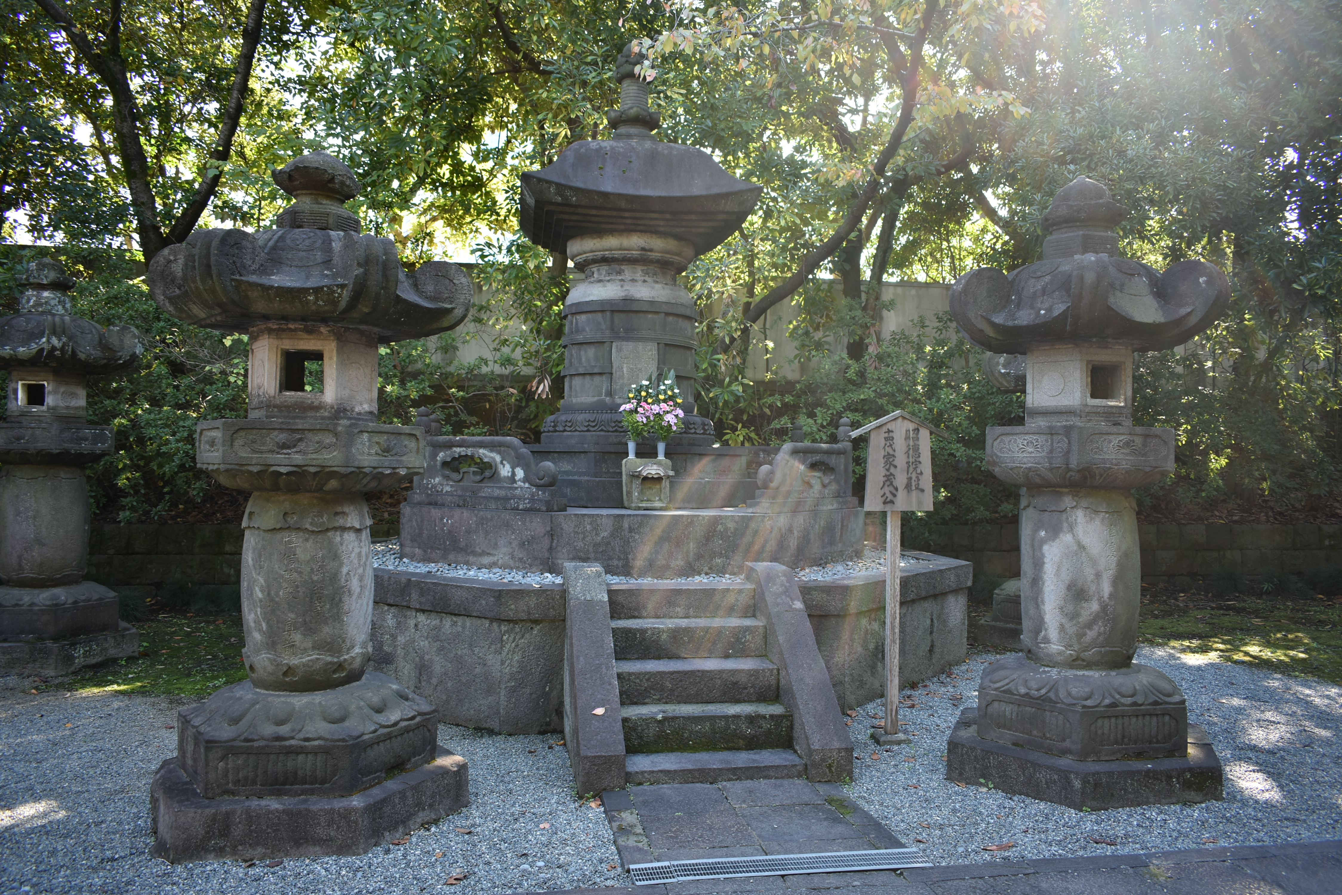 増上寺 御霊屋